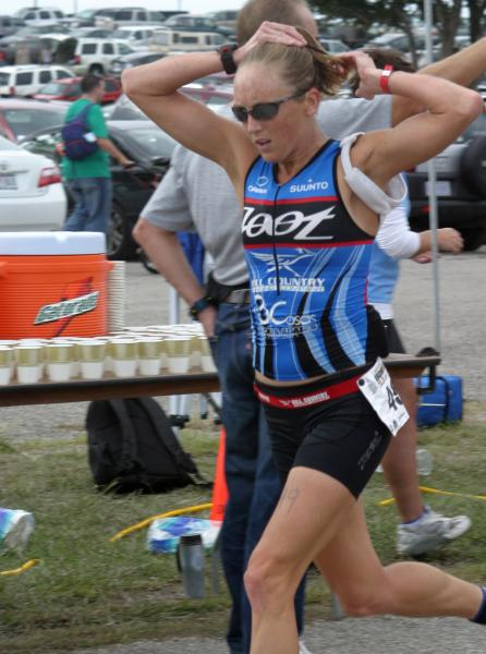 Kelly Williamson – beim Ironman 70.3 Austin (2009)